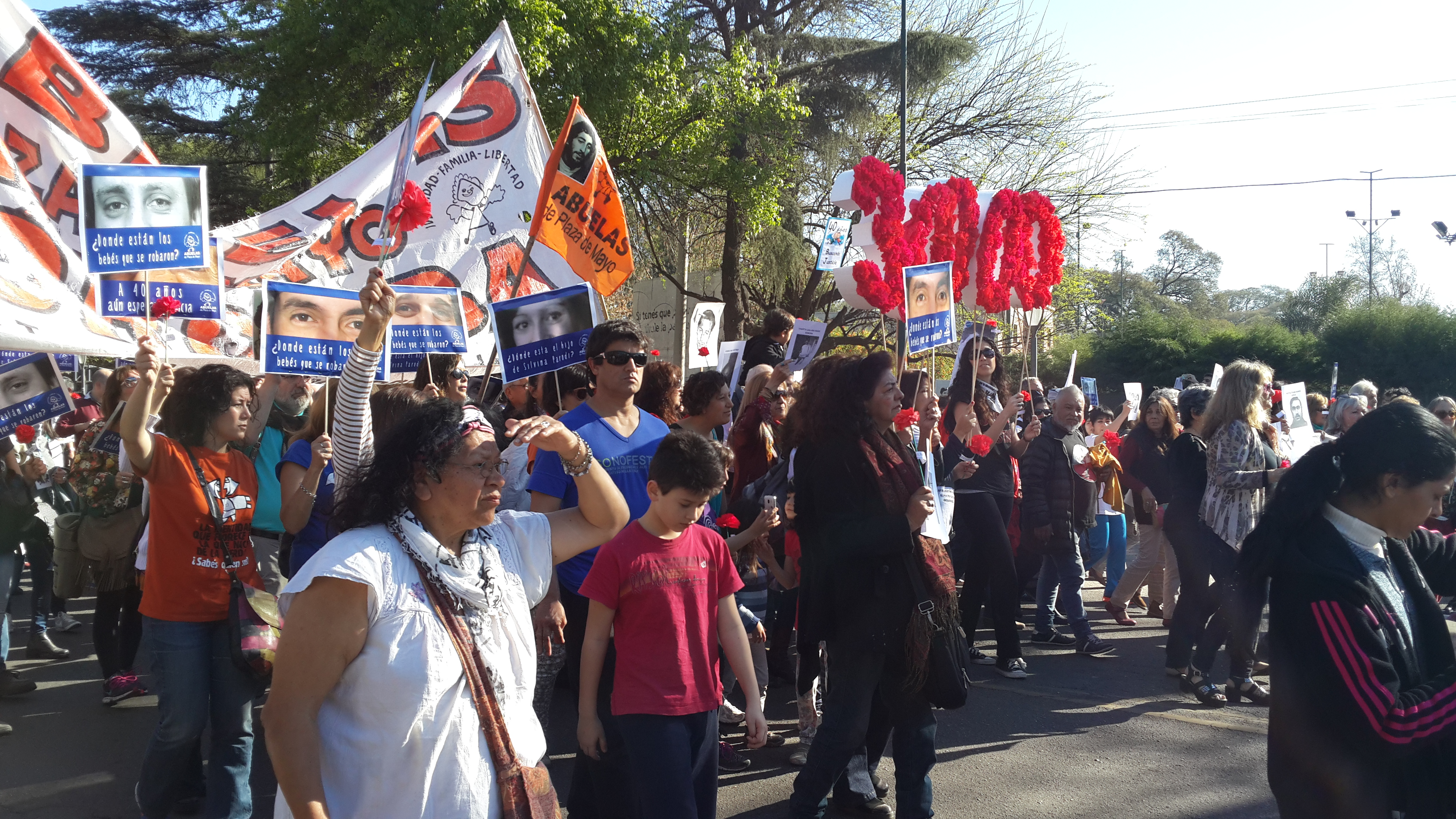 Córdoba, agosto de 2016. Unas 10 mil personas acompañaron la lectura de la sentencia de la Megacuasa La Perla. El Tribunal dictó 28 cadenas perpuetas, entre ellas la de Menéndez